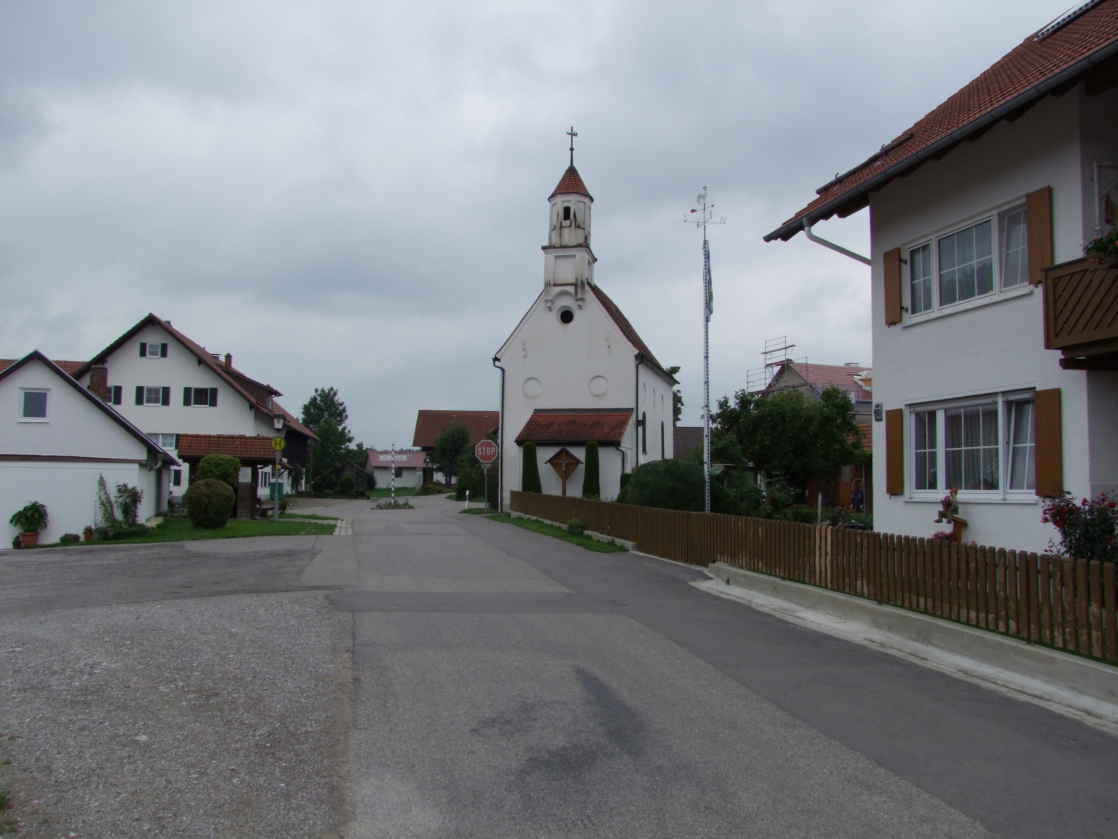 Die Kapelle zur St. Wolfgang in Schöneschch, einem Ortsteil von Bad Wörishofen in Schwaben